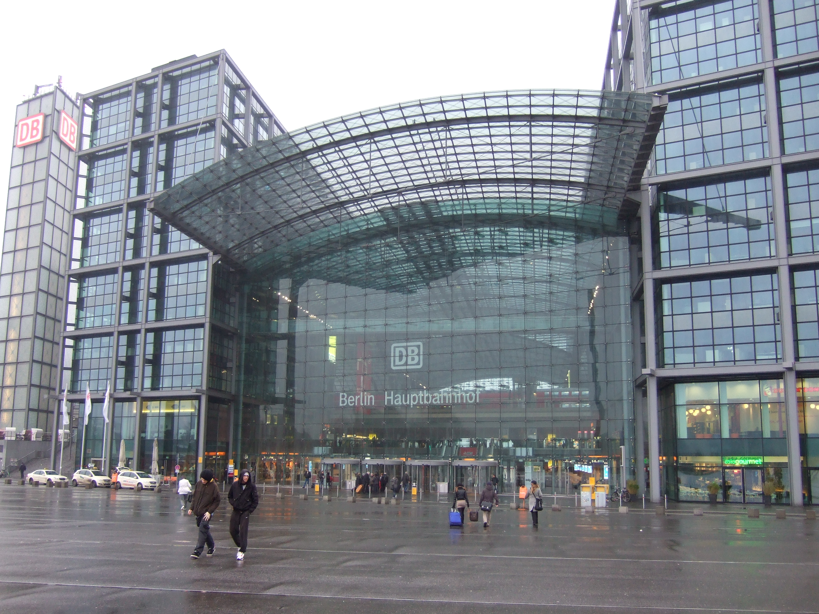 Průčelí hlavního nádraží v Berlíně, Německo